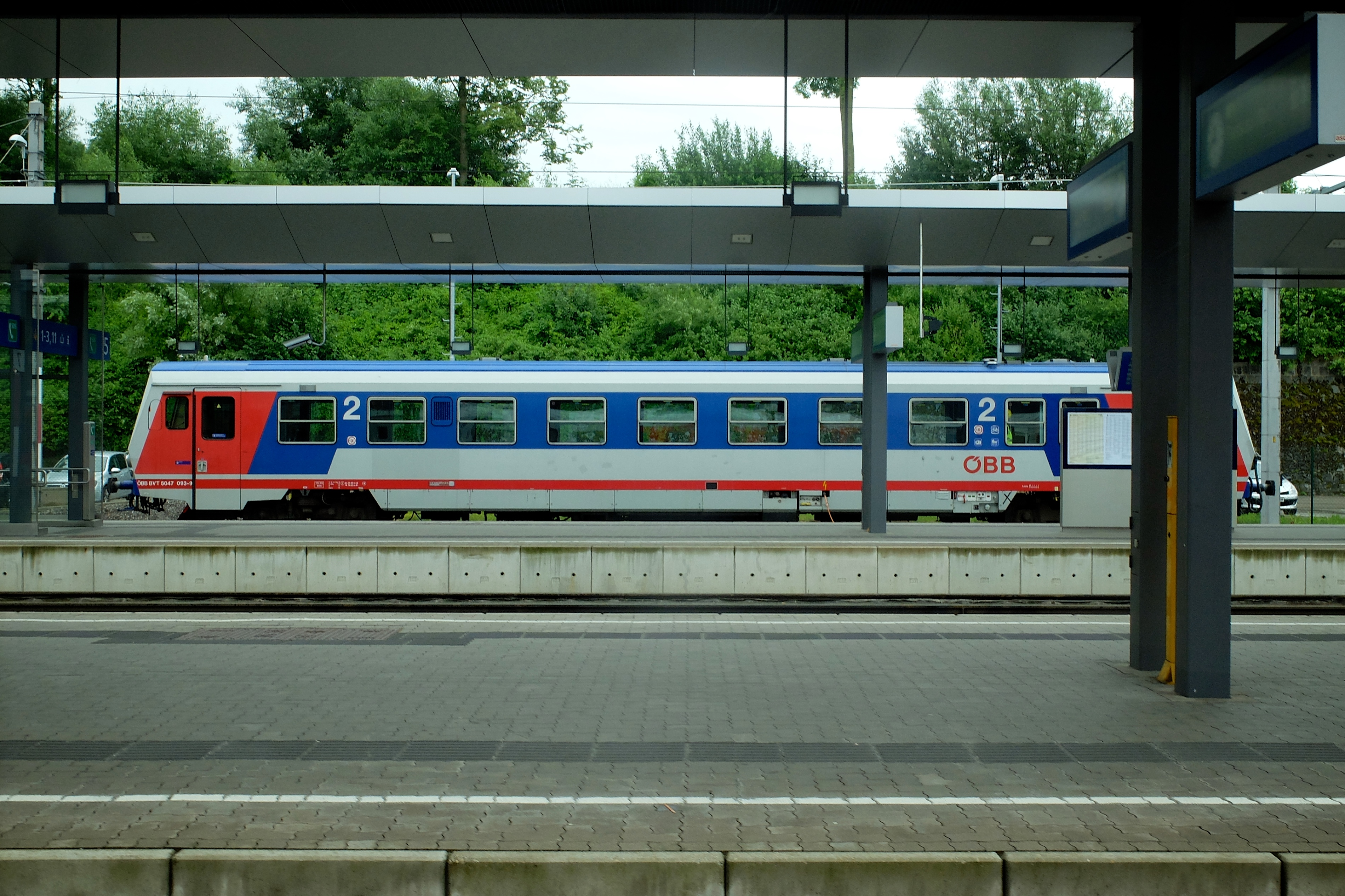 5047 093 am Bahnhof Neumarkt-Kallham